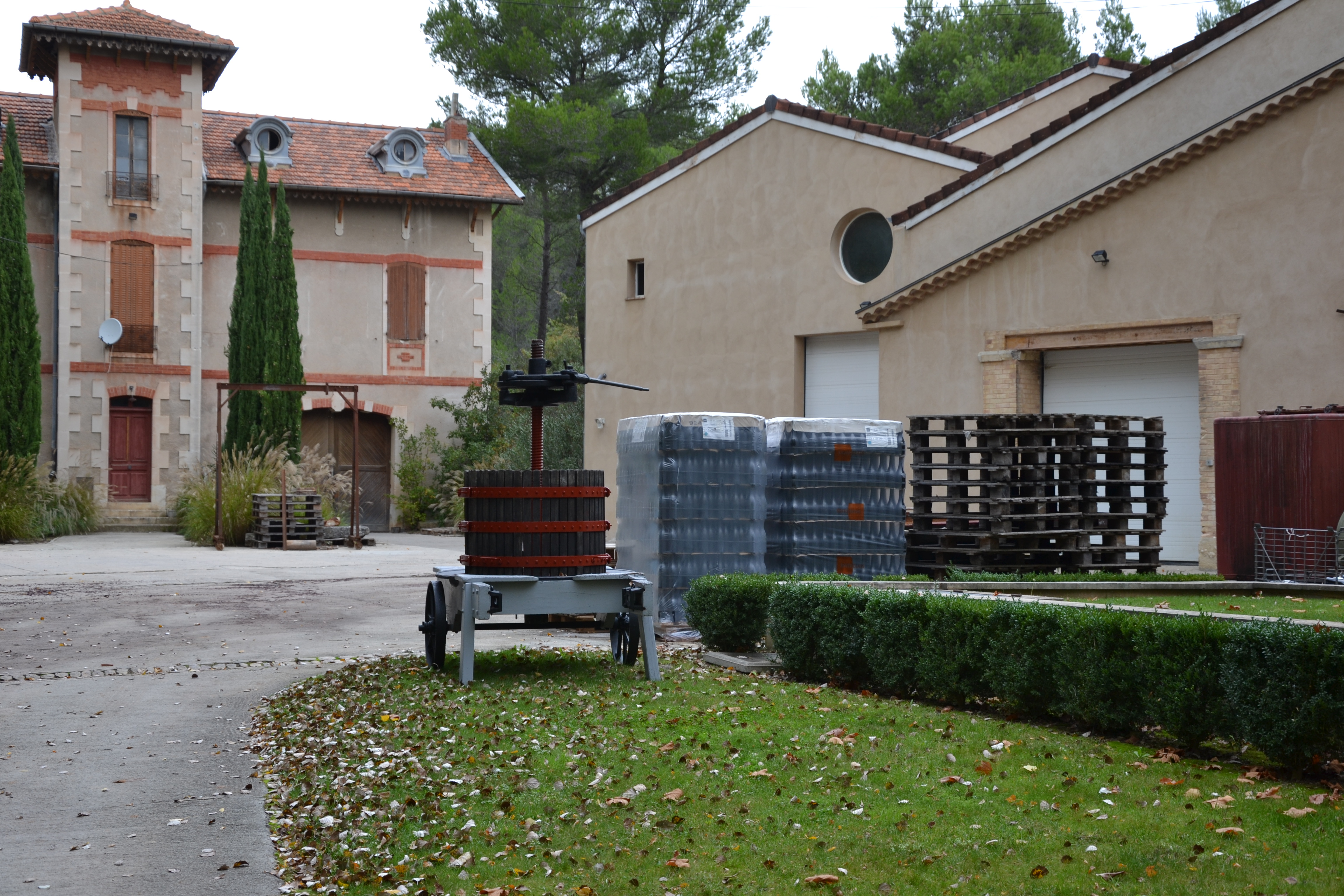 Bâtiments des anciennes thermes de Montmirail